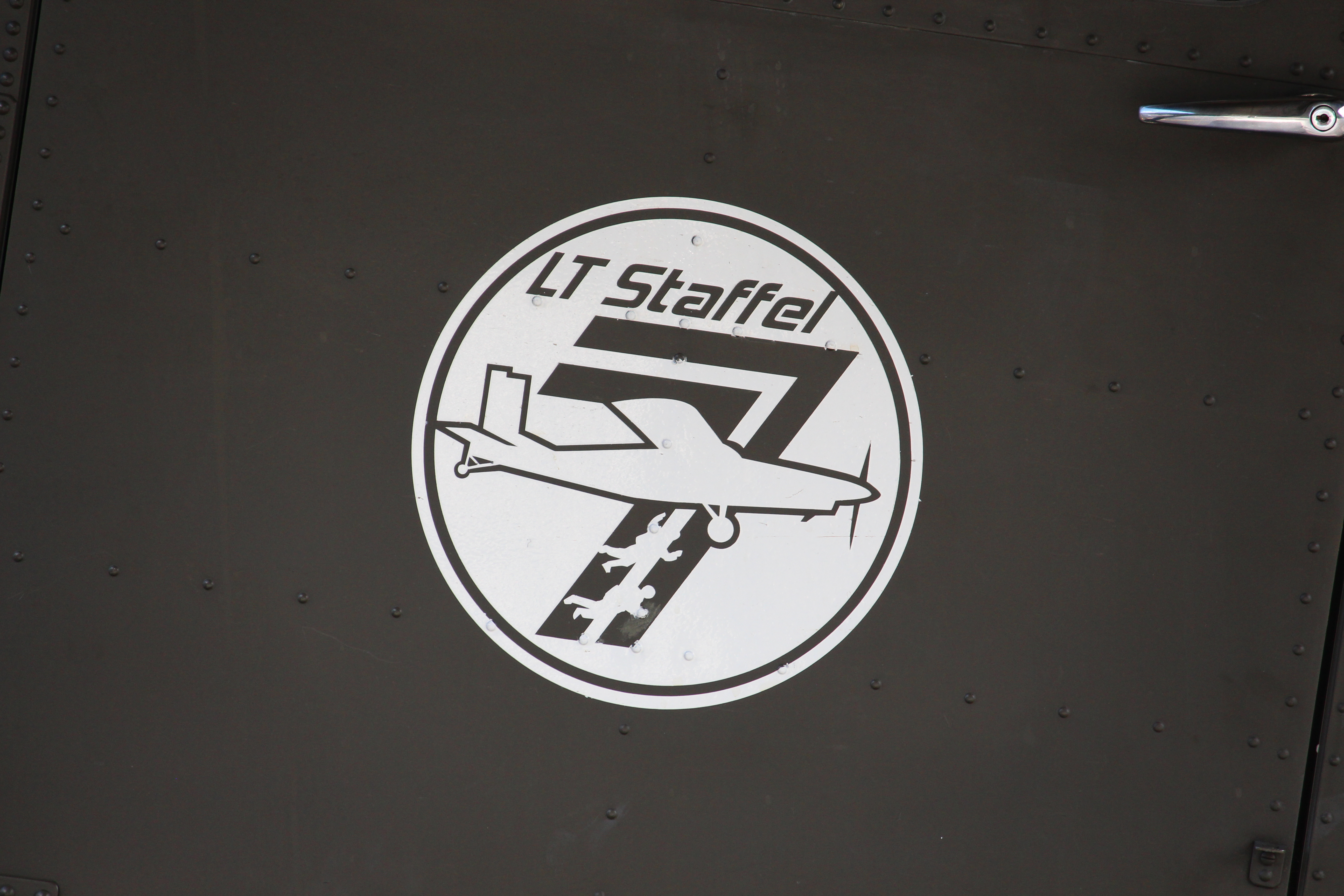 Pilatus PC-6 Turbo-Porter der Schweizer Luftwaffe am 75 Jahre Jubiläums des Militärflugplatz Alpnach